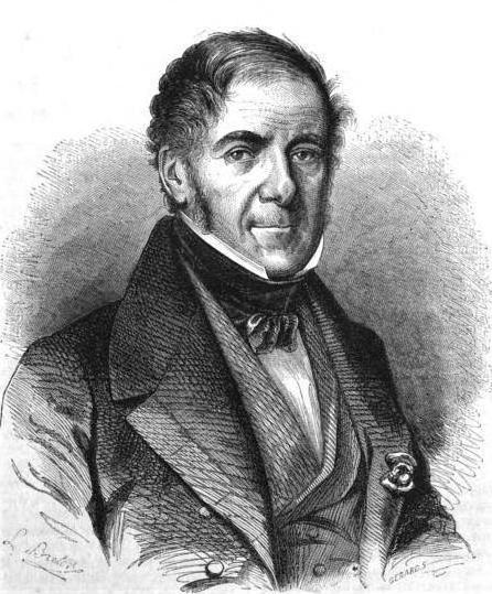 Baron Desnoyers, graveur.